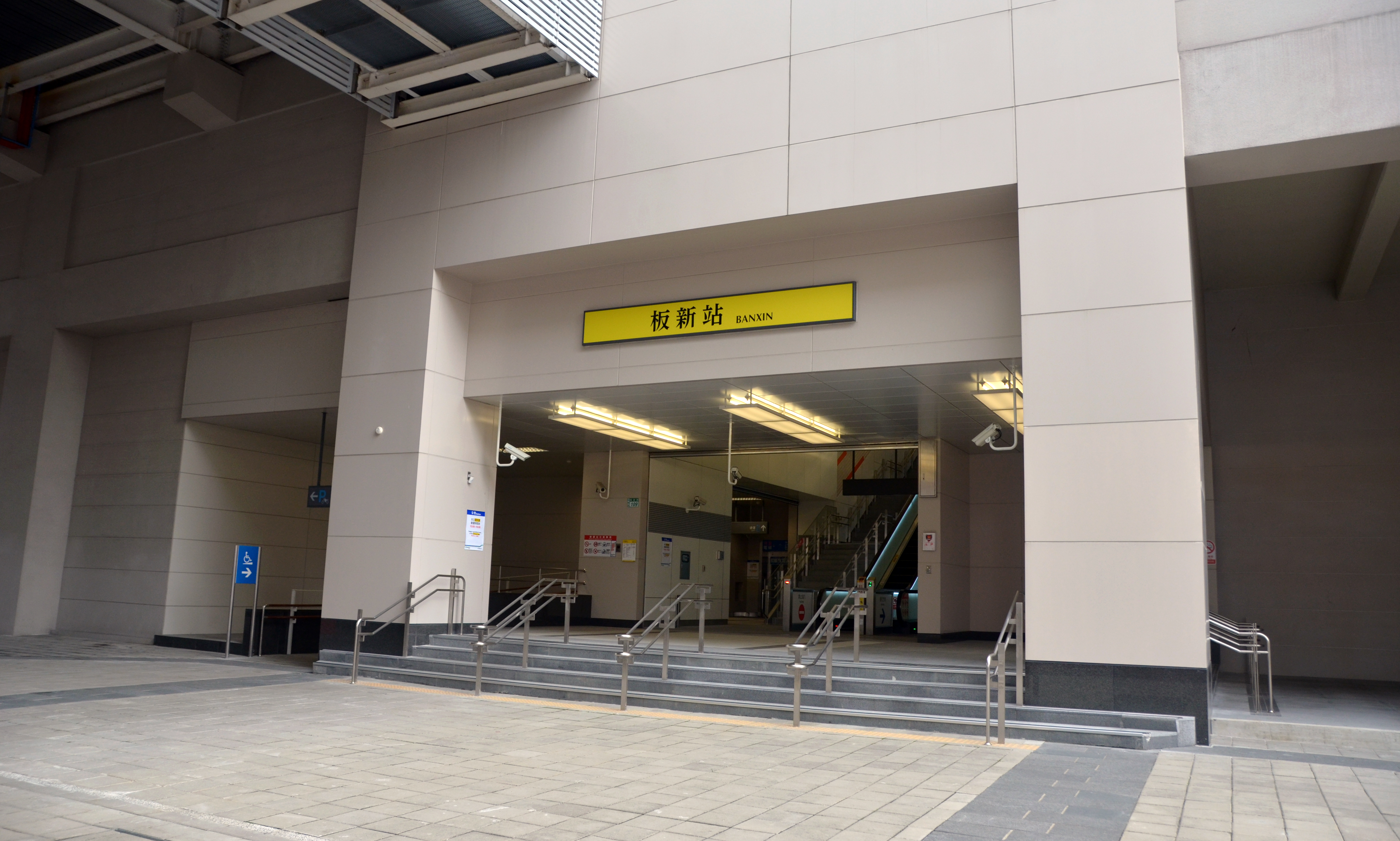 中文（台灣）: 台北捷運環狀線板新站出口。